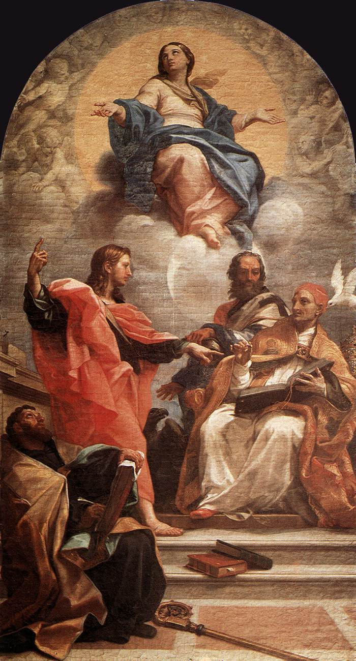 Der Heilige Johannes, der die Lehre von der Unbefleckten Empfängnis den Hll. Gregor, Augustinus und Johannes Chrysostomos (Kirchenväter) erklärt.